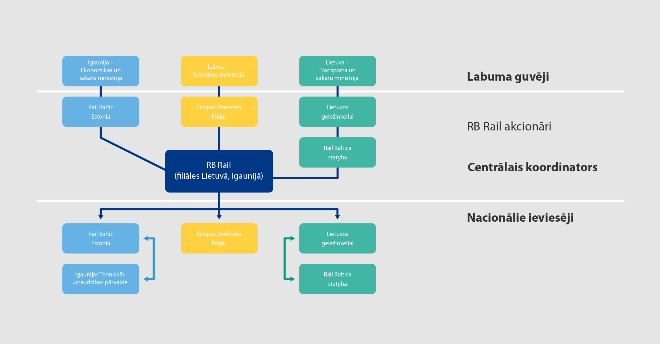 Rail Baltica projekta ieviesēju struktūra